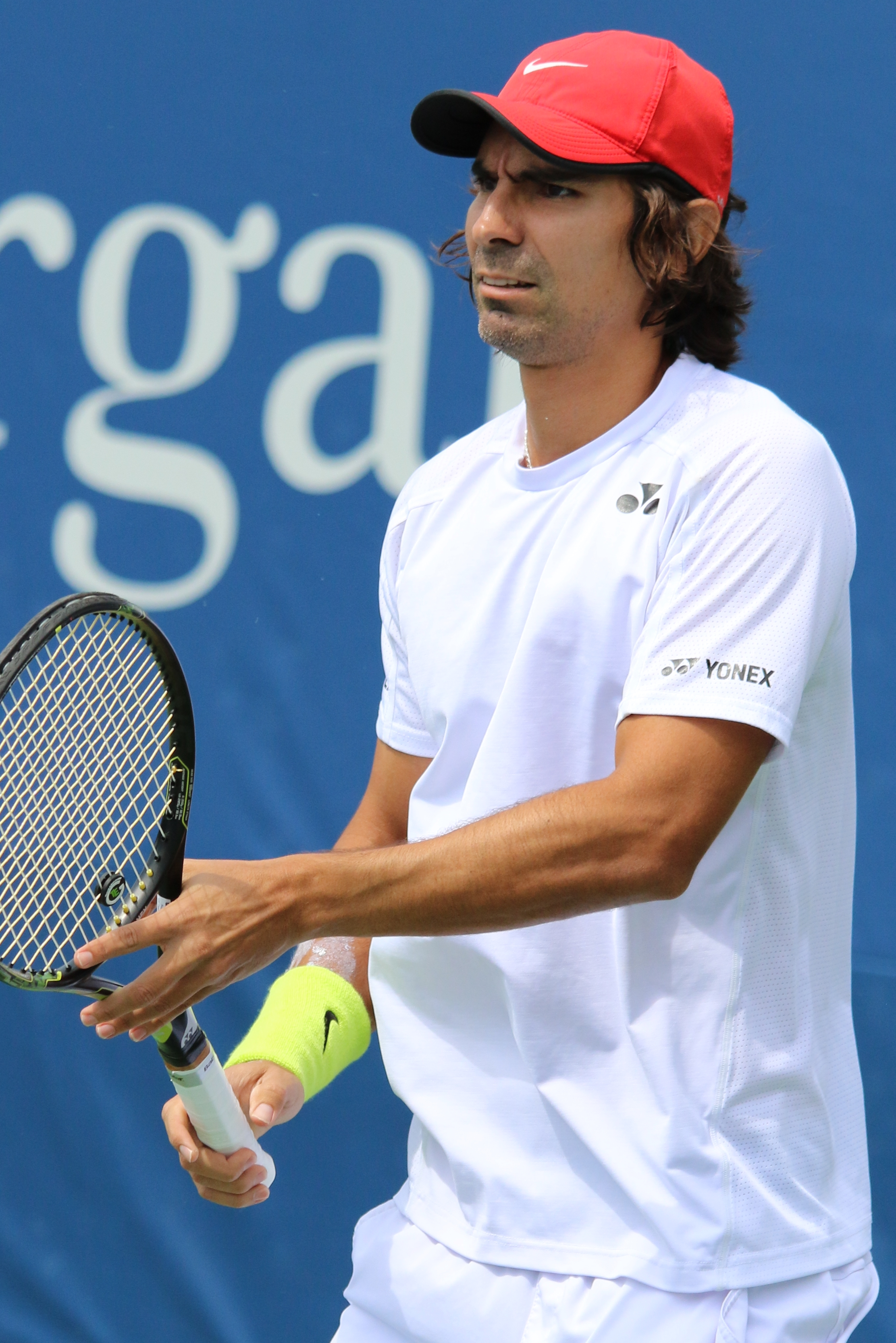 Peralta US16 (4)